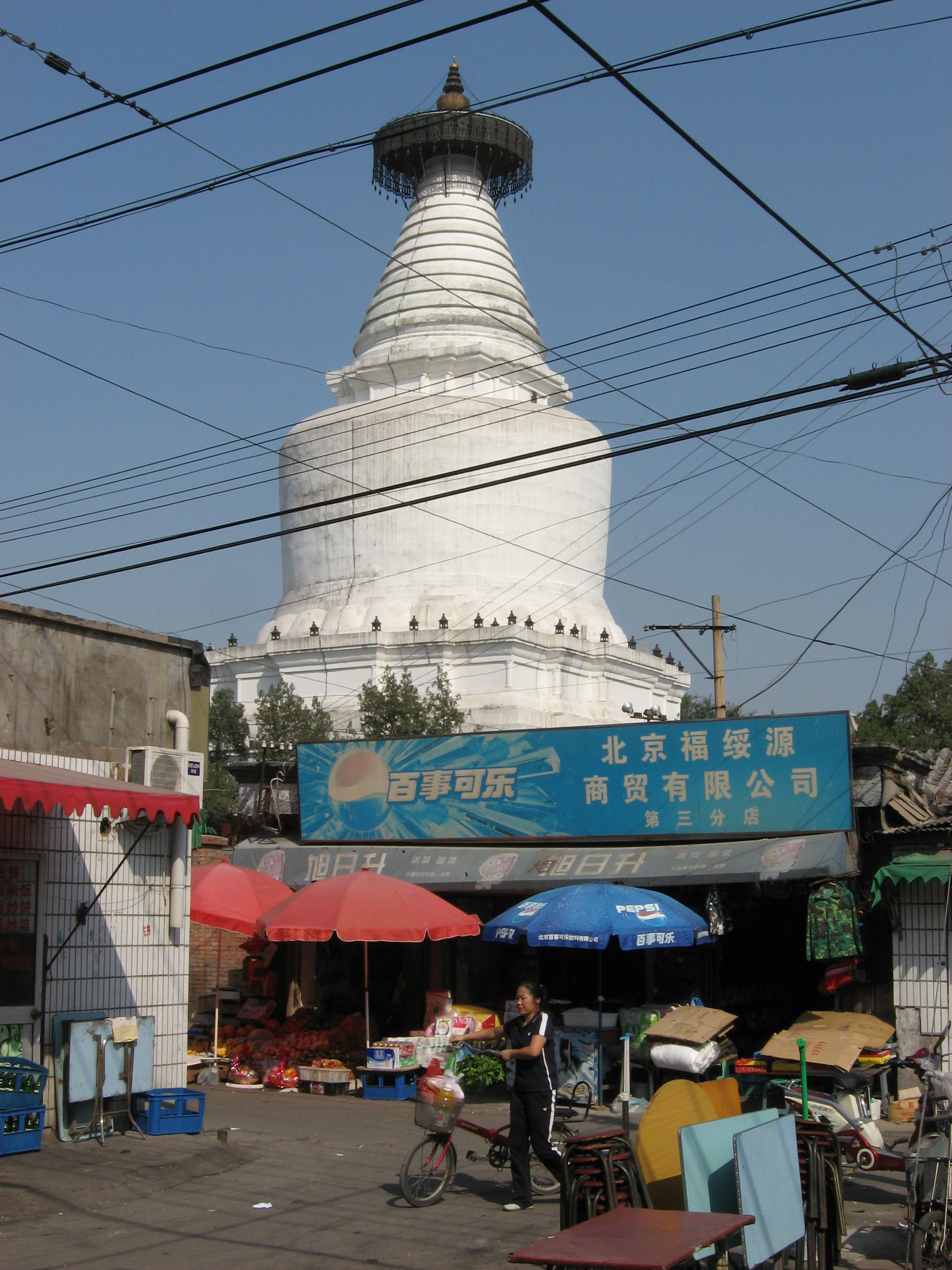 White Stupa (Baitasi) in Beijing